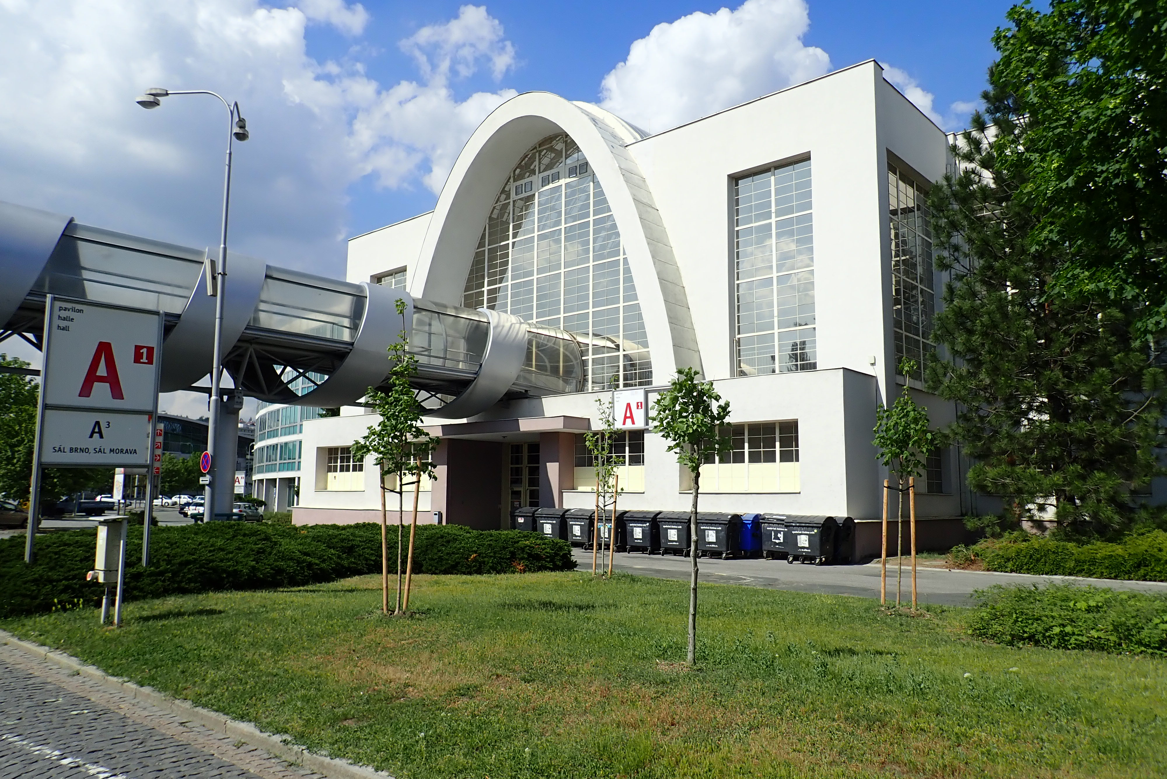 Vstupní portál pavilonu A s propojovacím mostem z pavilonu C